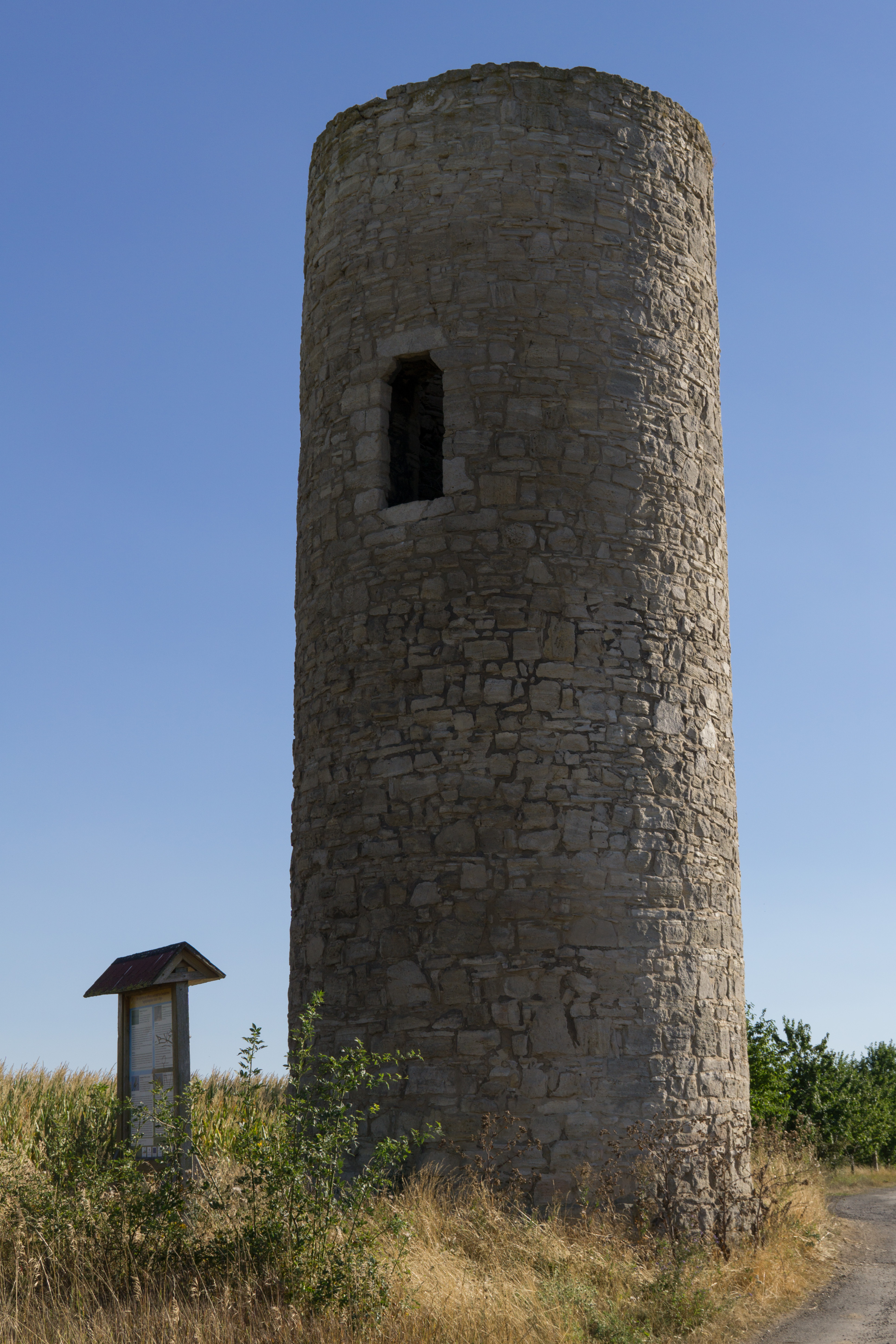 Alte Warte nahe Hakeborn